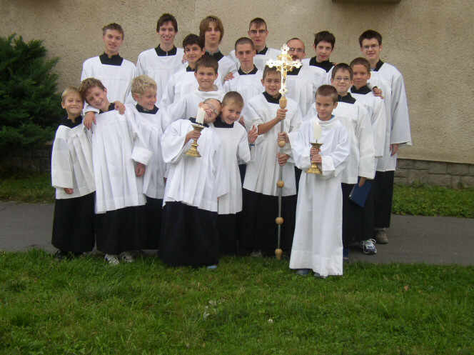 Společné foto čtyráckých ministrantů